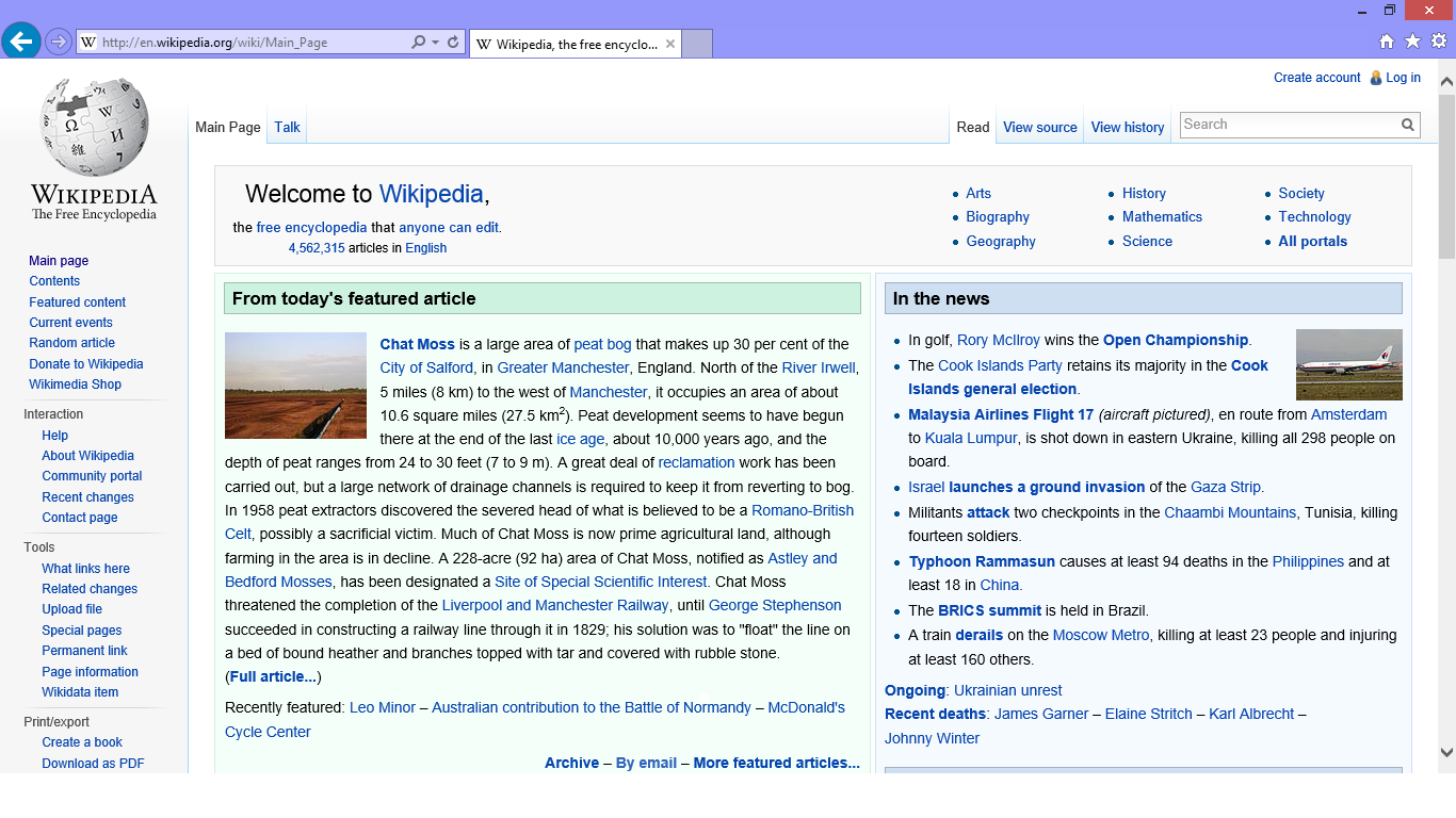 Wikipedijina početna stranica na Internet Exploreru 11 na Windowsu 8.1